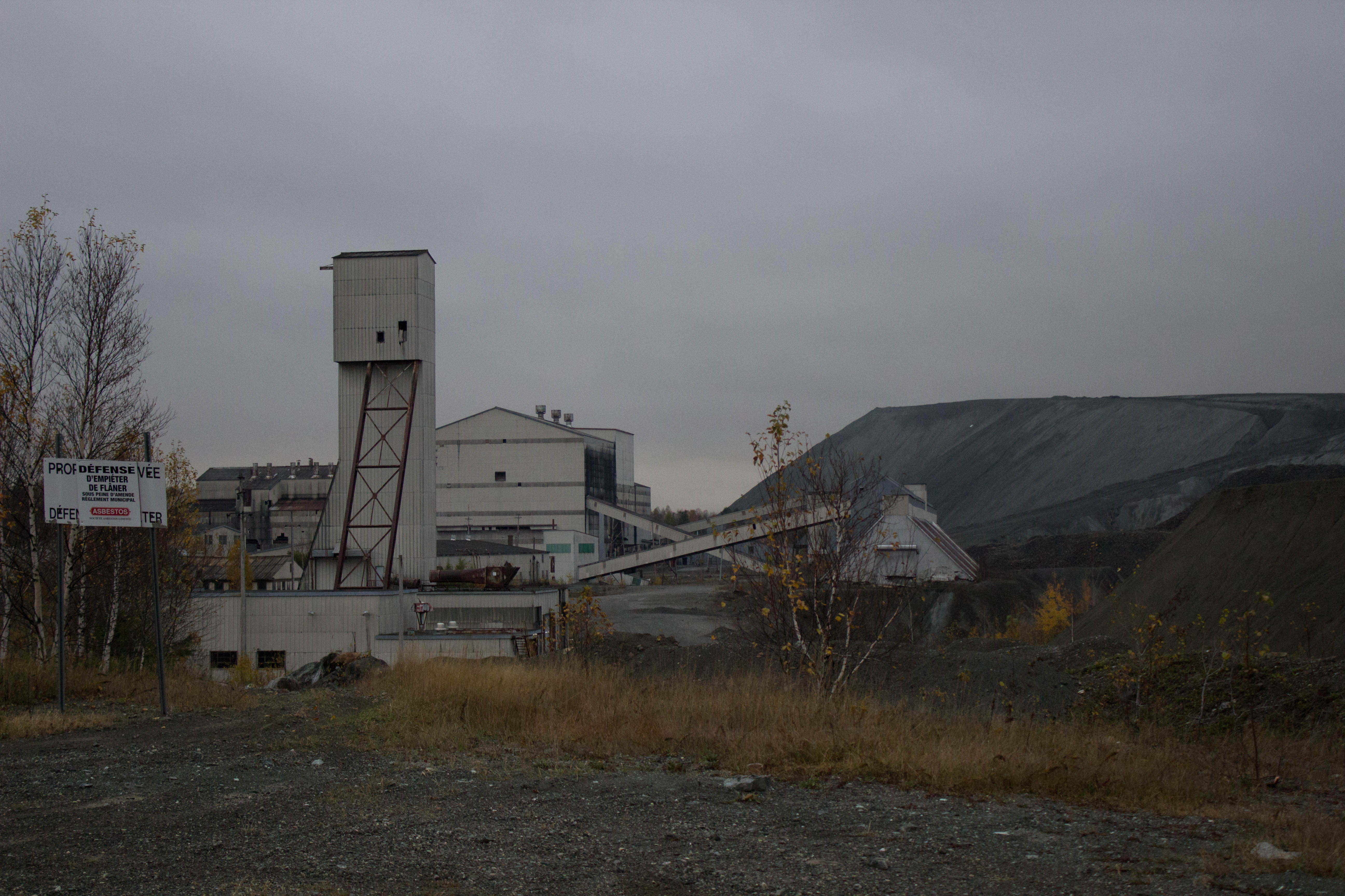 Carrière appartenant à la compagnie Asbestos.